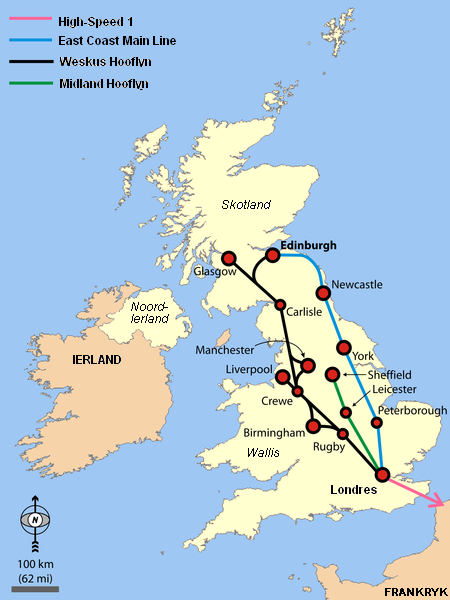 Simple Oorsigkaart van die WCML, ECML, Midland Hooflyn et CTRL.